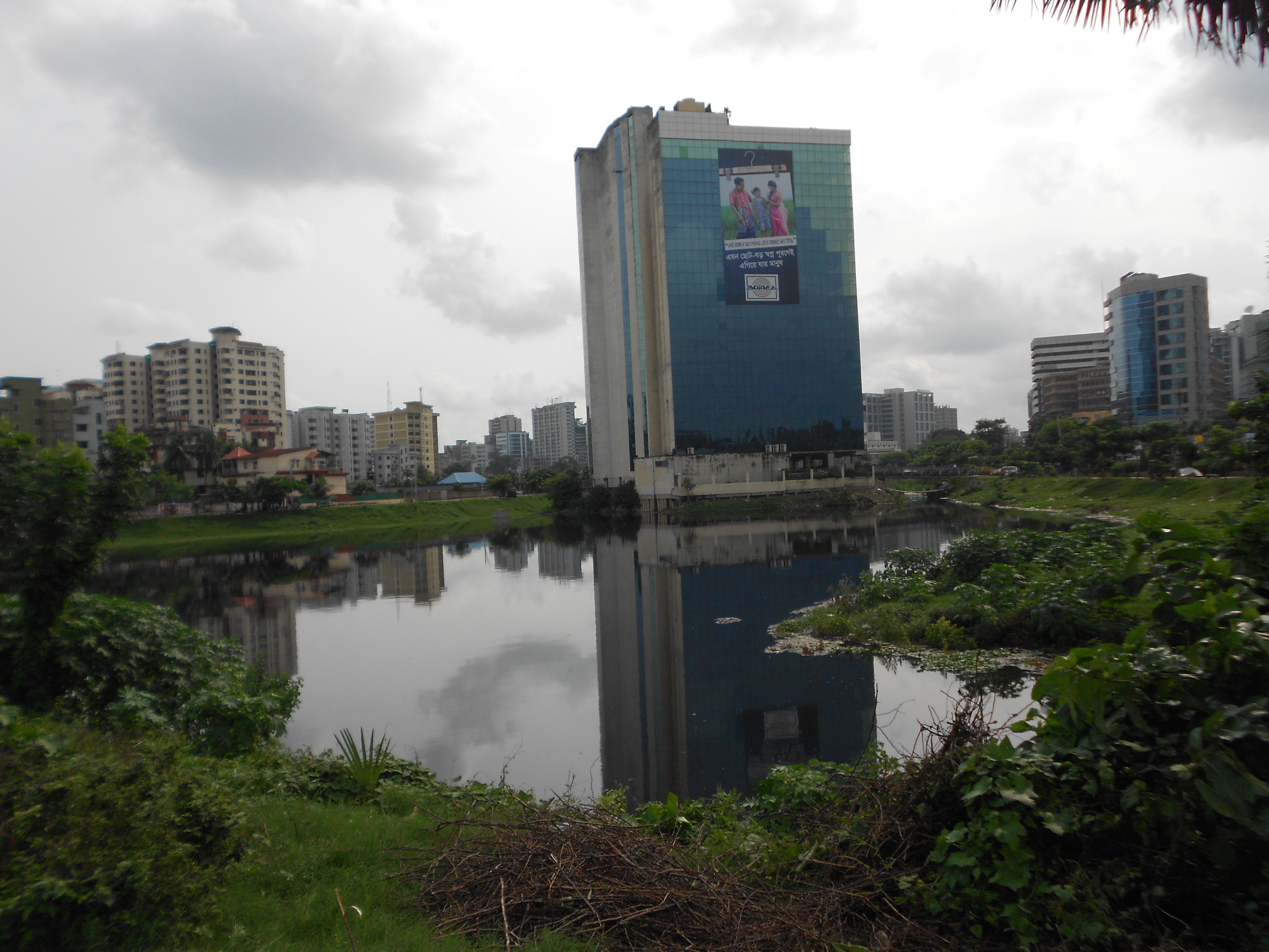 This Picture Stout The Side of Hatirjil.